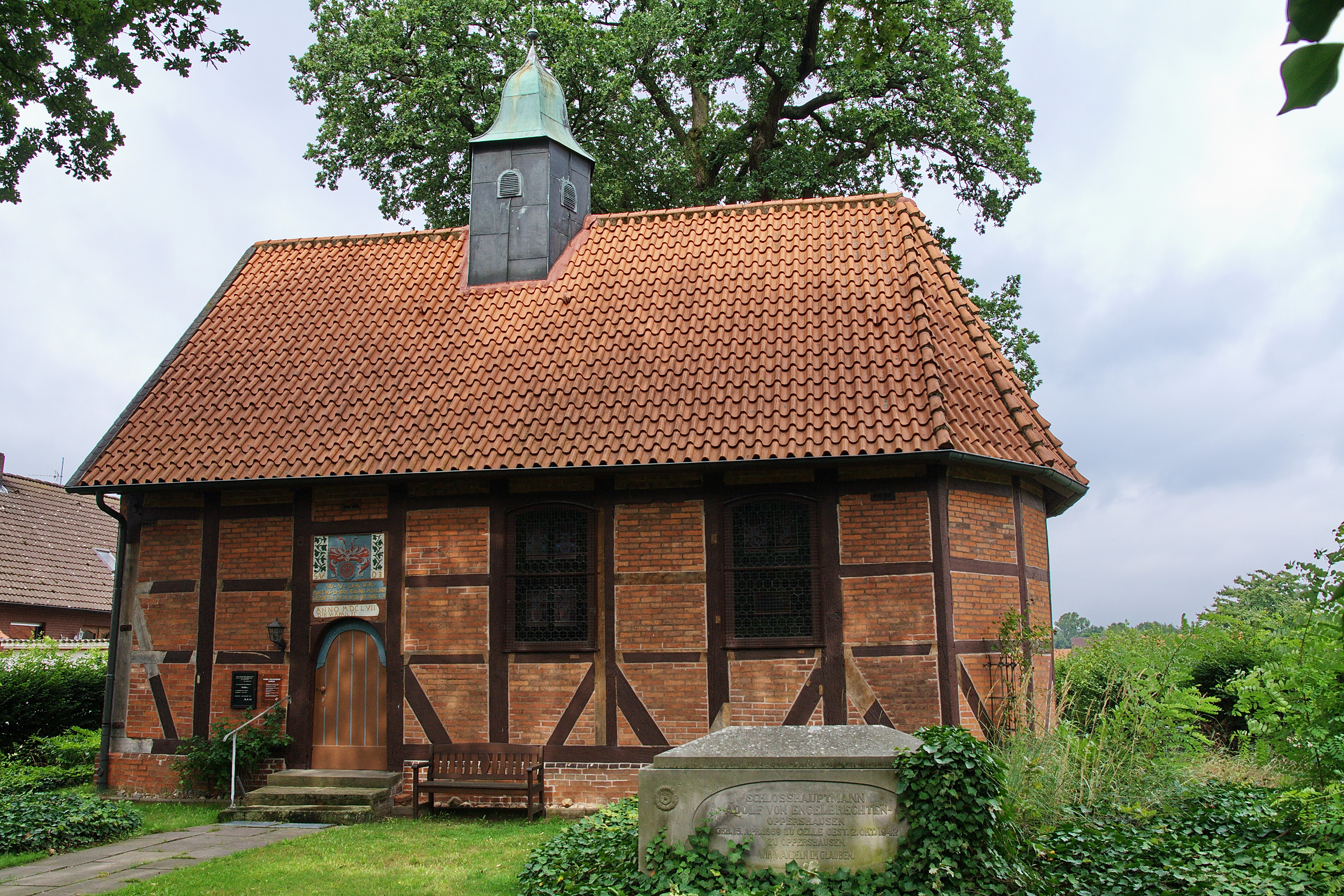 Maria-Magdalenen-Kapelle von 1657 in Oppershausen (Wienhausen), Niedersachsen, Deutschland